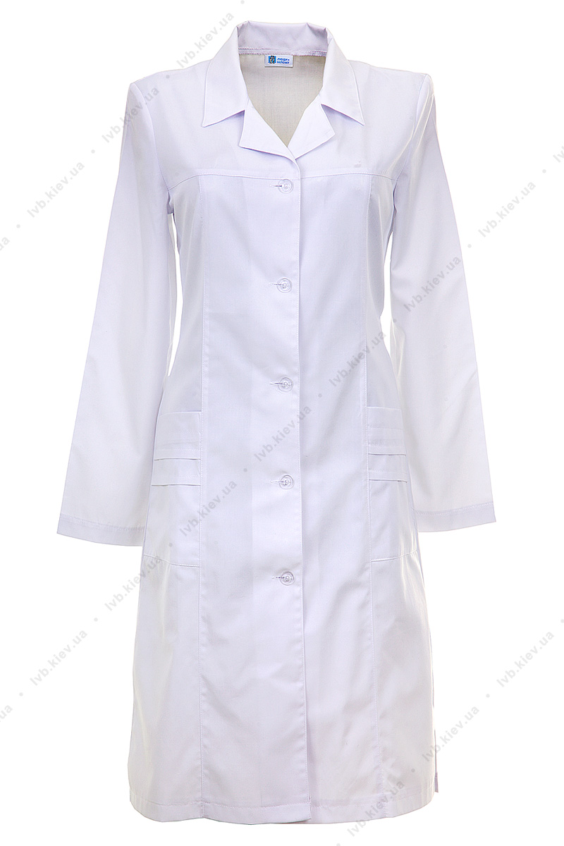 Классический медицинский халат белого цвета, женский